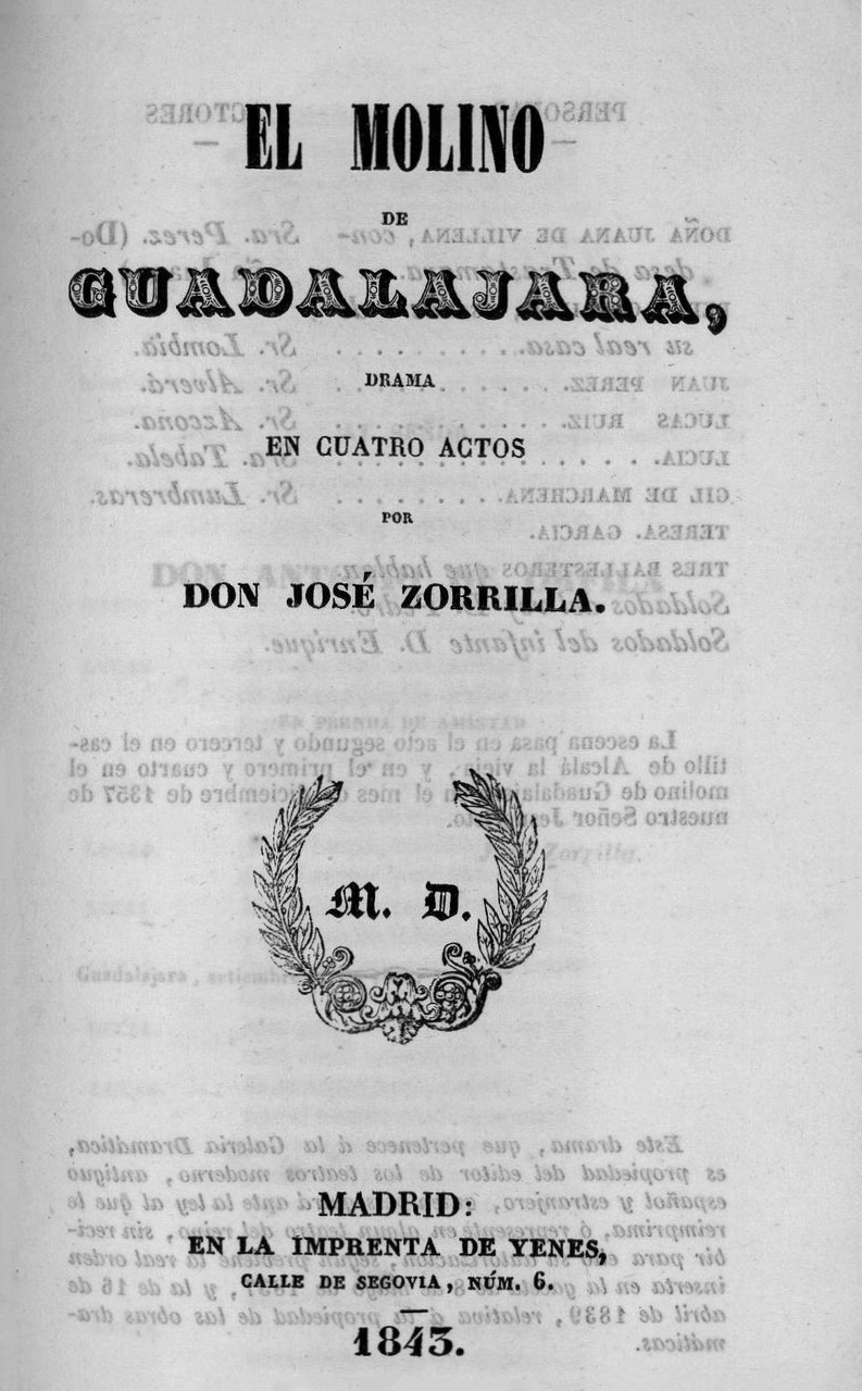 Portada del libro "El molino de Guadalajara" de José Zorrilla. Publicado en Madrid, en 1843. Es una obra de teatro en 4 actos, estrenada el 22 de octubre de 1843 en el Teatro de la Cruz (Madrid), que transcurre en Guadalajara y Alcalá de Henares.